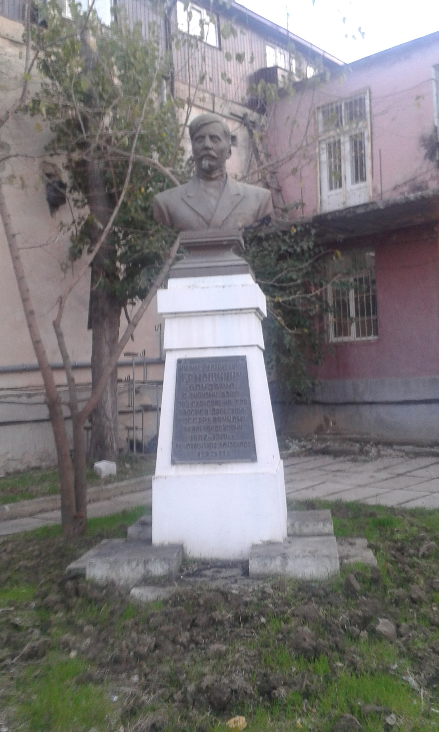 Памятник революционному деятелю начала XX века Н. Г. Ермошкину, на территории Махачкалинского бондарного завода